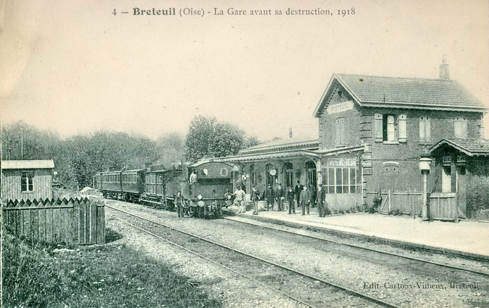 Carte postale ancienne éditée par Cartoux-Vimeux, N°4 BRETEUIL (Oise) La gare avant sa destruction, 1918